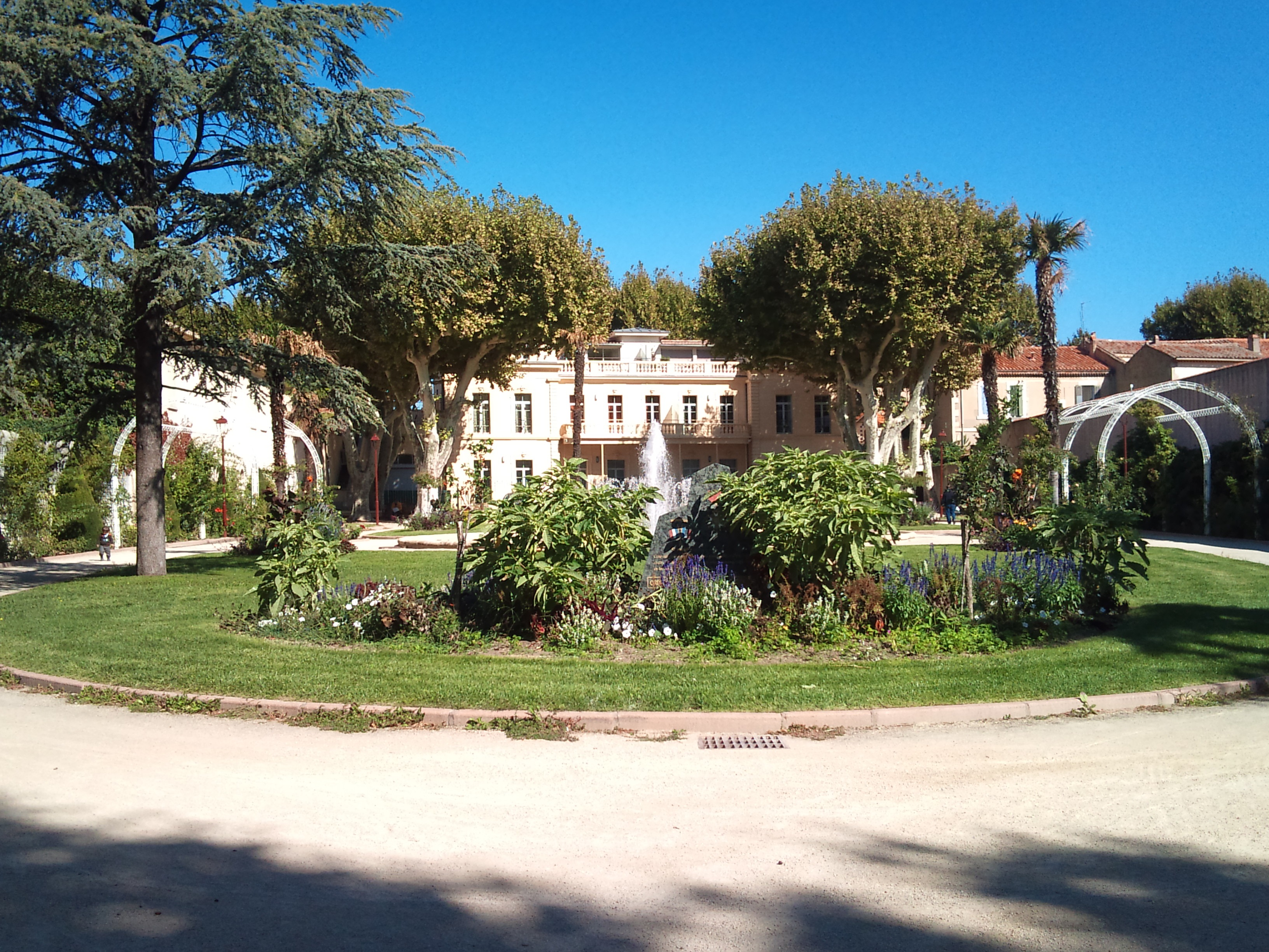 Photo prise en 2012